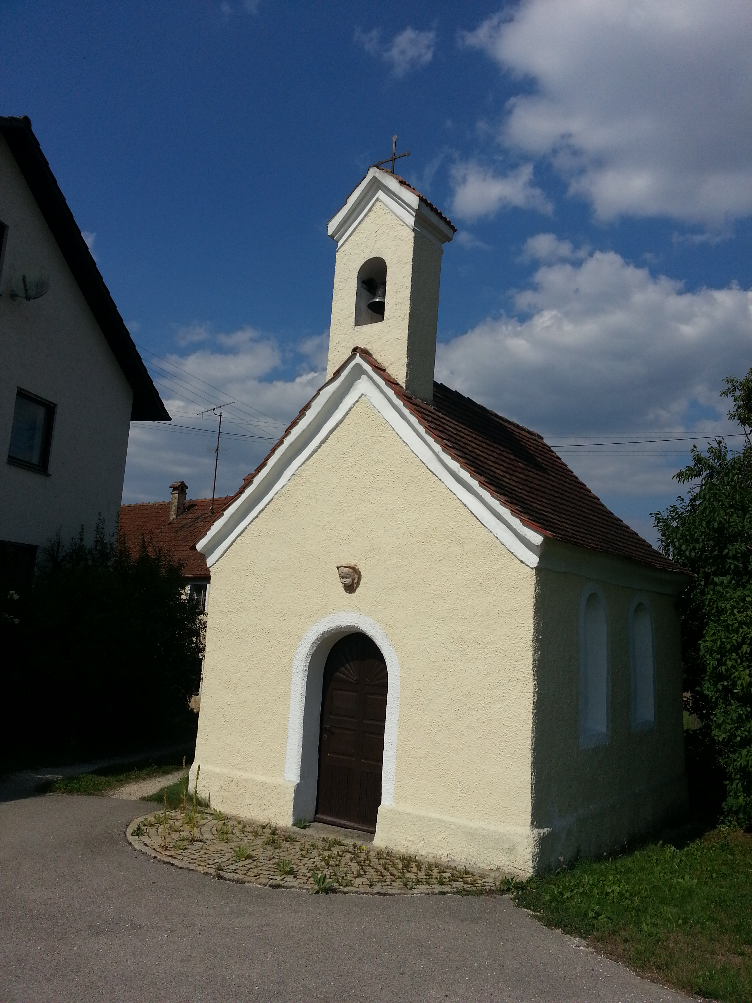 Marienkapelle Mannsdorf (Parsberg) D-3-73-151-41